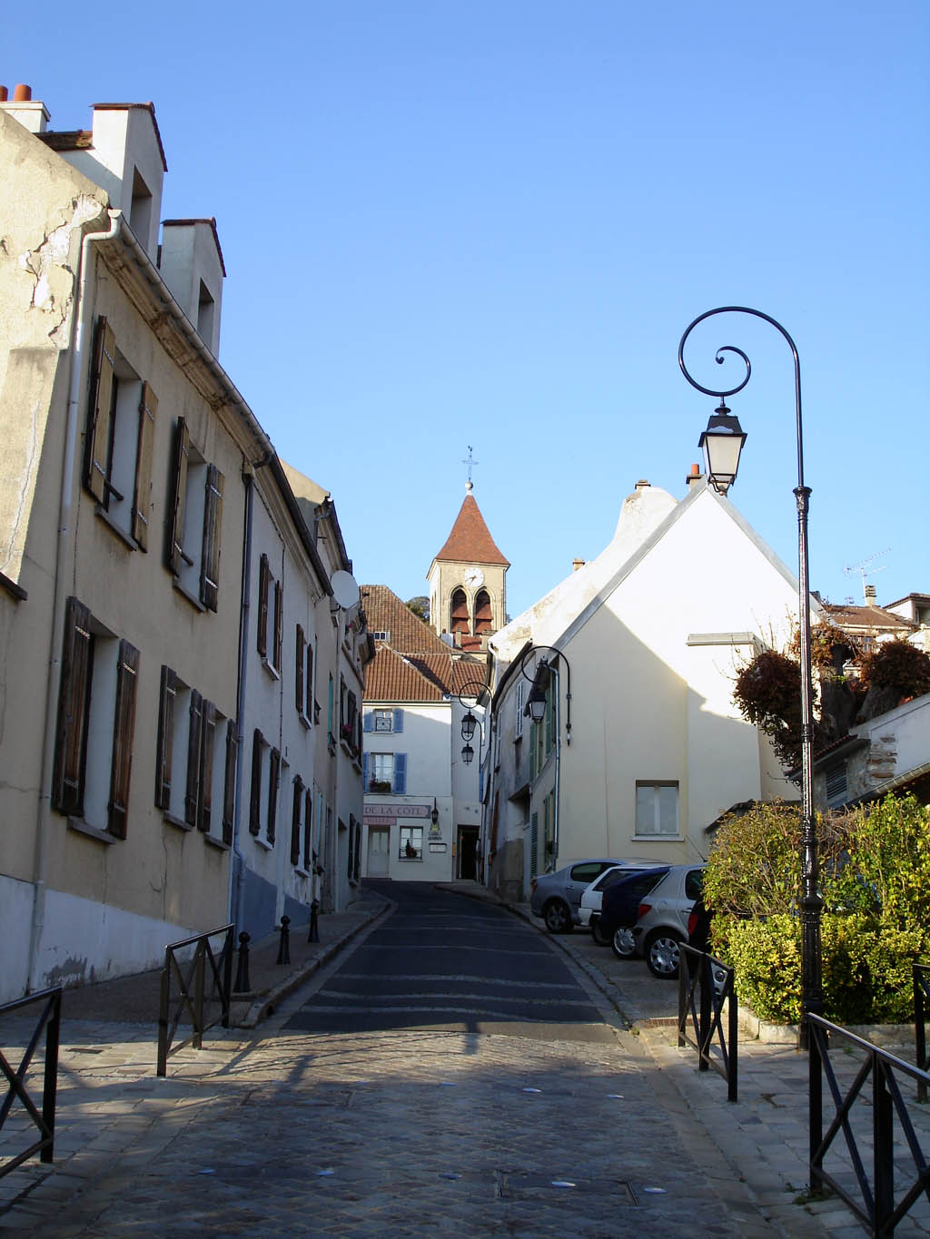 La rue de Rubelles à Saint-Prix (Val-d'Oise), France